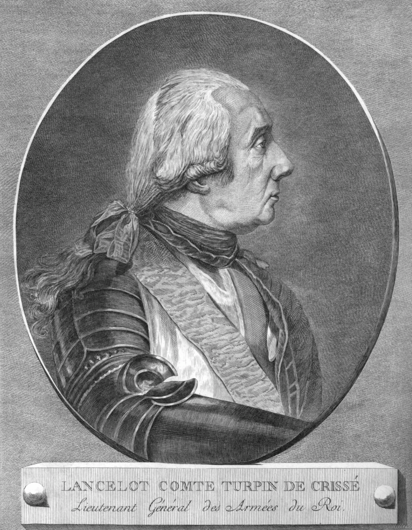 Lancelot Turpin de Crissé (1716-1783), militaire et écrivain français